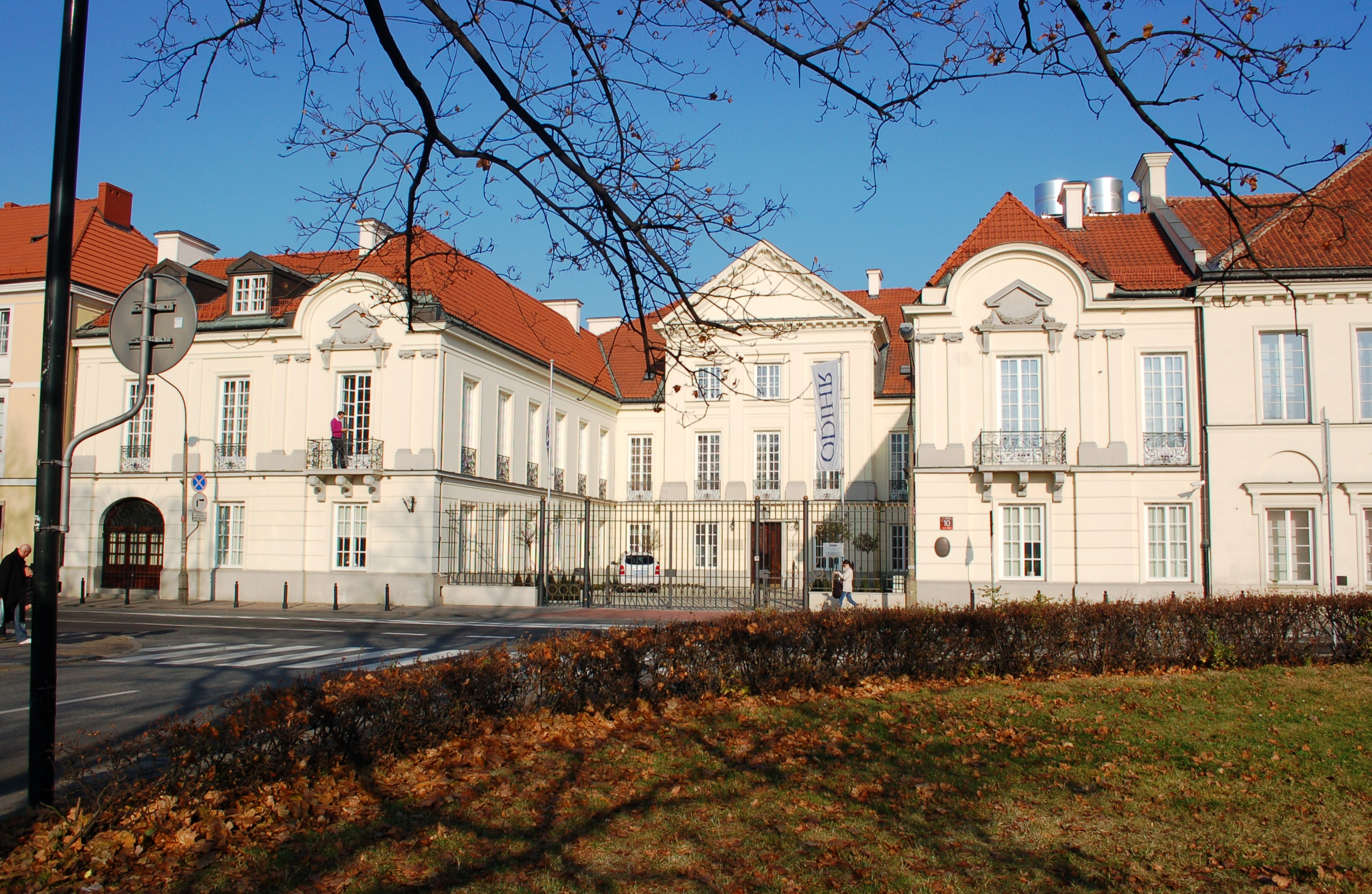 Warschau, Miodowa-Strasse